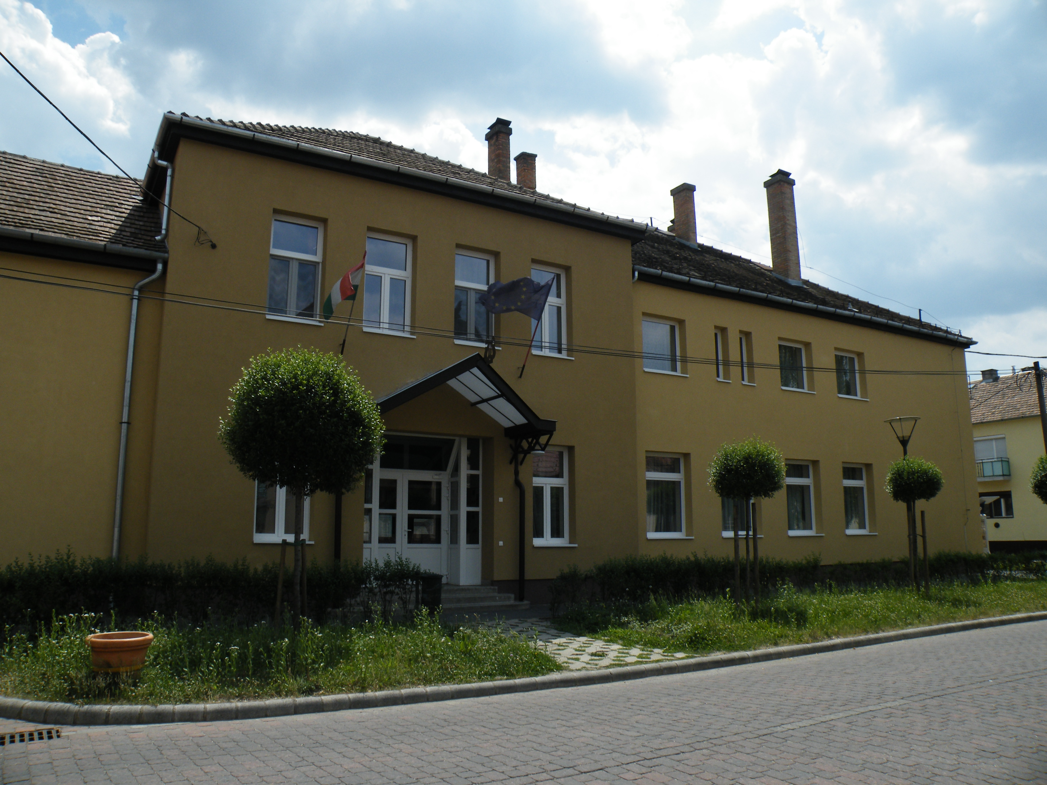 A Rózsavölgyi Márk Zeneiskola Óváros téri épülete